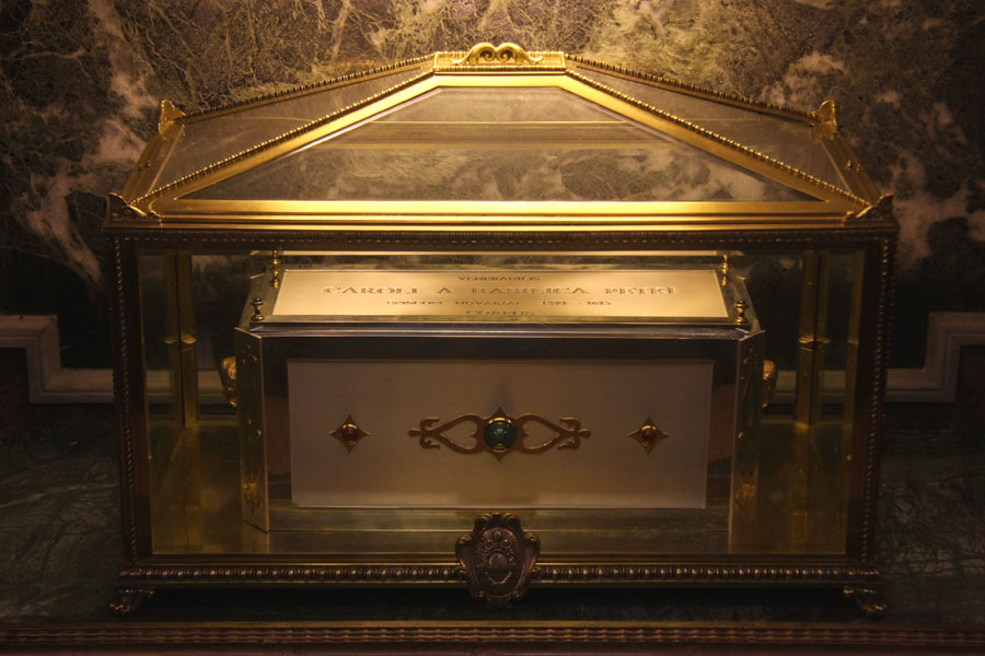 Urna che contiene le spoglie del vescovo Carlo Bascapè, conservata nella chiesa di San Marco a Novara